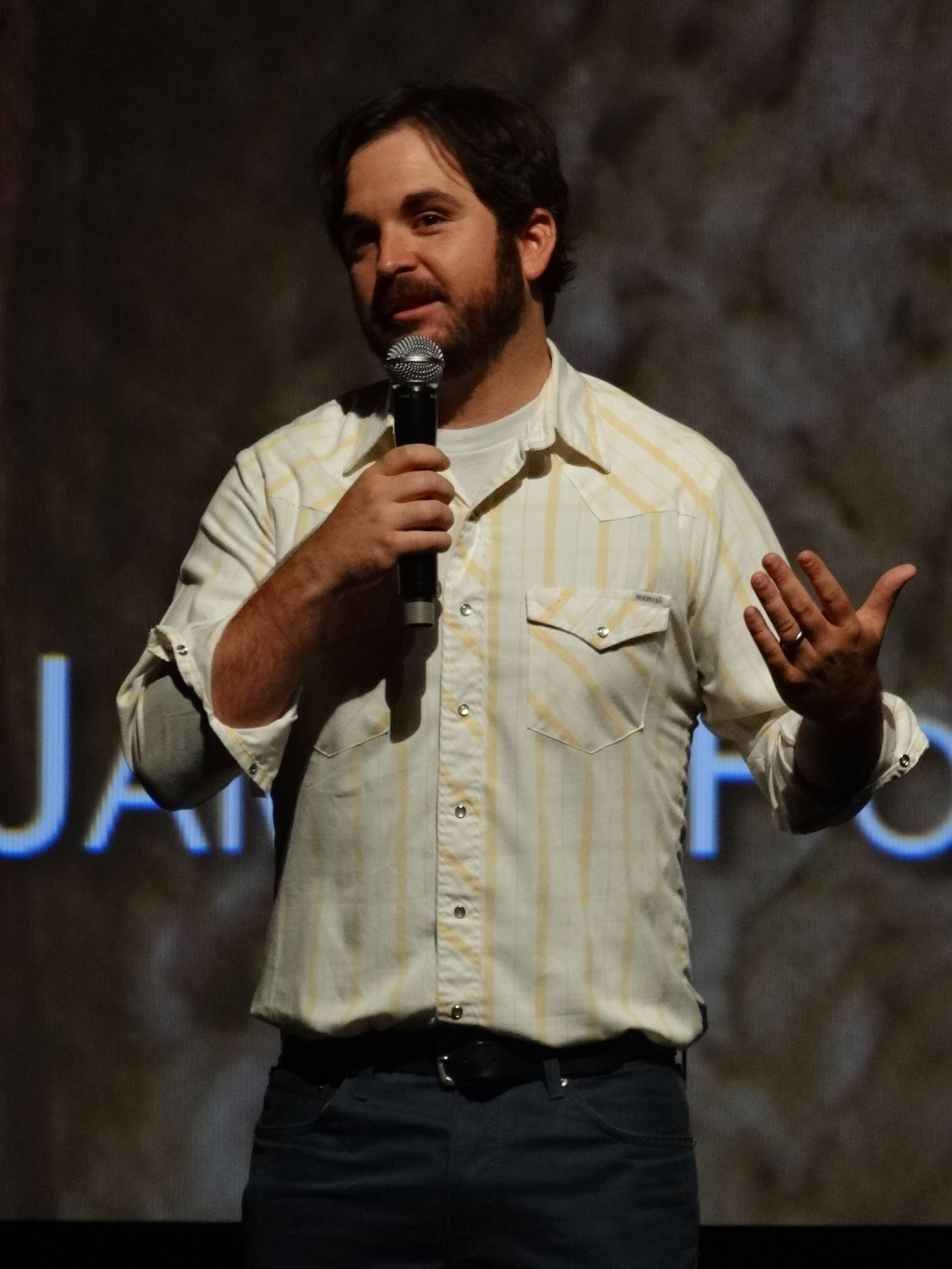 Festival de deauville 2012